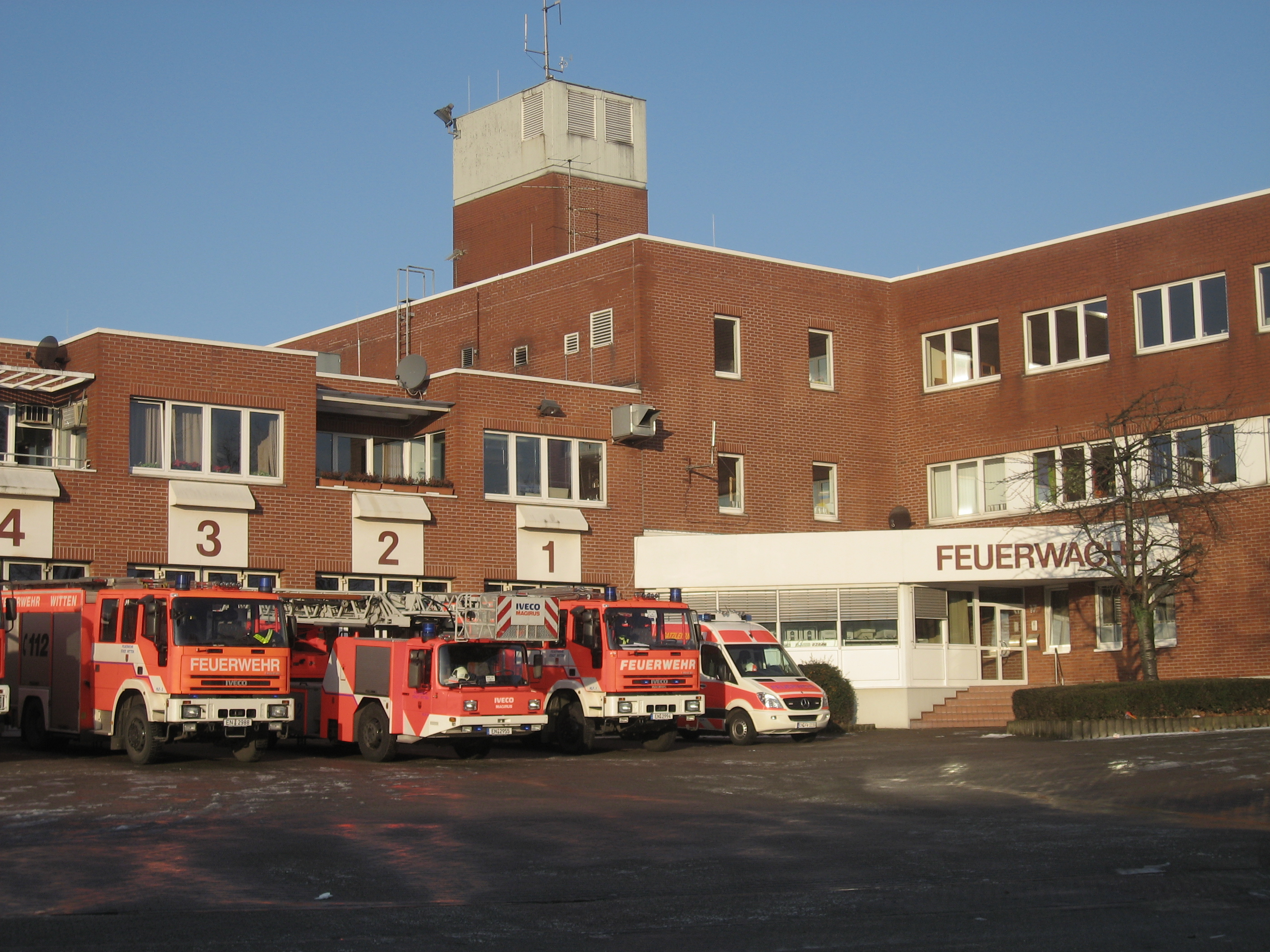 Witten, Feuerwehr an der Dortmunder Straße